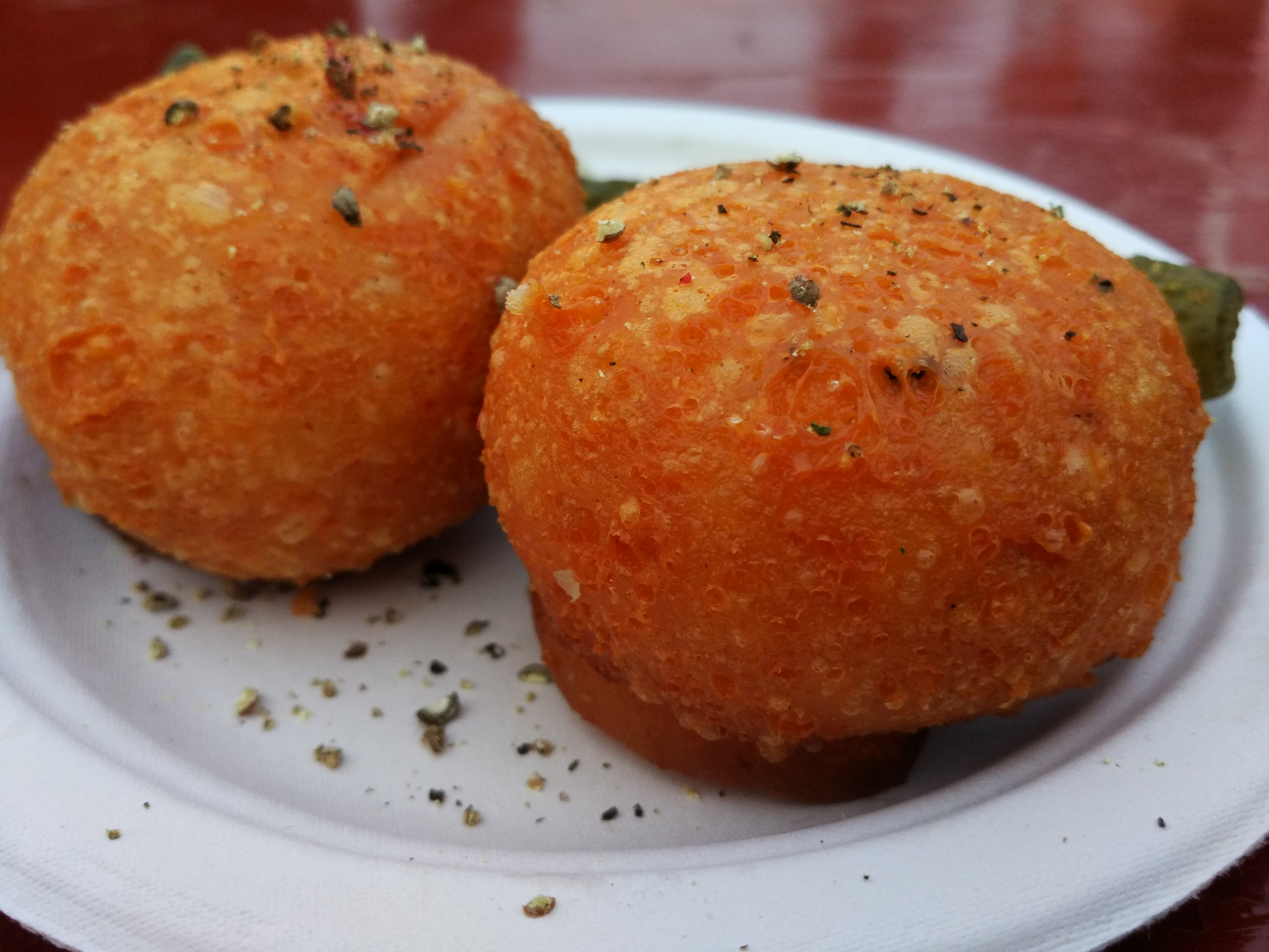 Deux Malakoffs vaudois